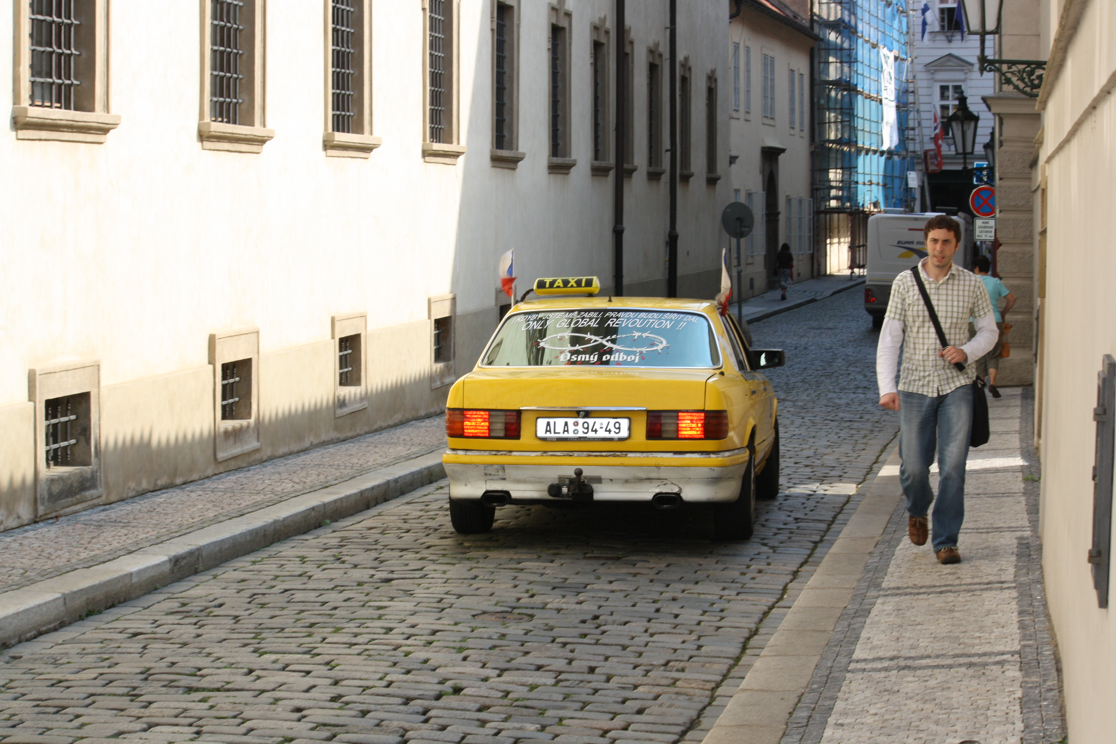 Praha-Malá Strana, Nebovidská ulice, od Maltézského náměstí. Taxi taxikářského aktivisty Zdeňka Ponerta, známého například konflikty s úředníky a policisty na Staroměstském náměstí. (Vyfoceno v době, kdy v těsné blízkosti u ministerstva školství, mládeže a tělovýchovy probíhal protest proti úředníku Ladislavu Bátorovi.)